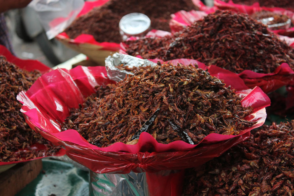 Se muestra un acercamiento a un montón de chapulines cocinados y en venta en un puesto afuera del mercado en el centro de Oaxaca.